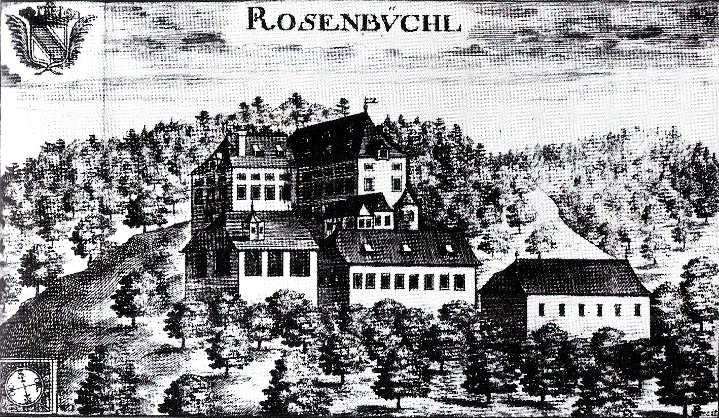 Schloss Rosenbichl, errichtet 1535, Gemeinde Liebenfels, Kärnten, Österreich